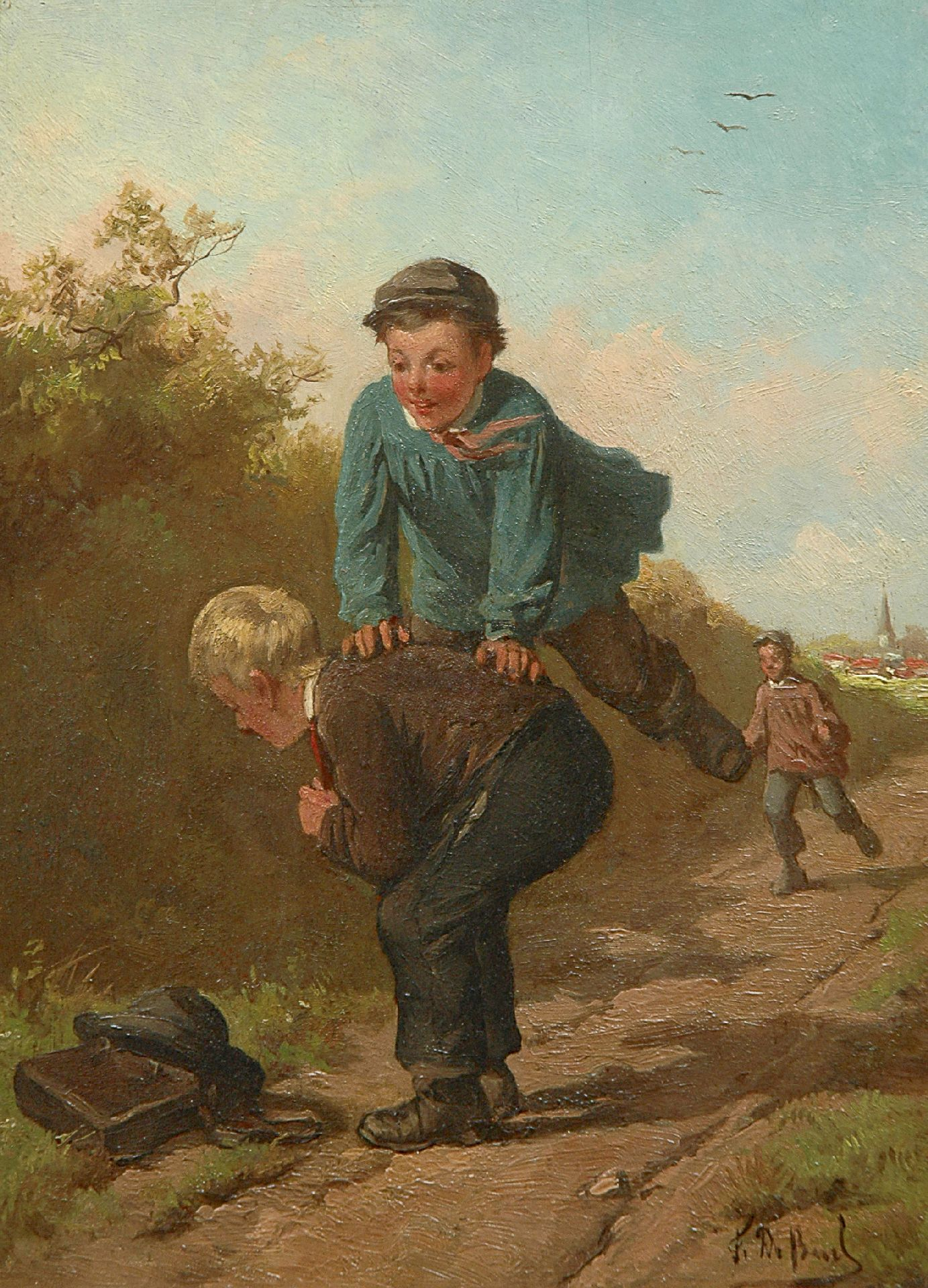 Haasje-over spelen